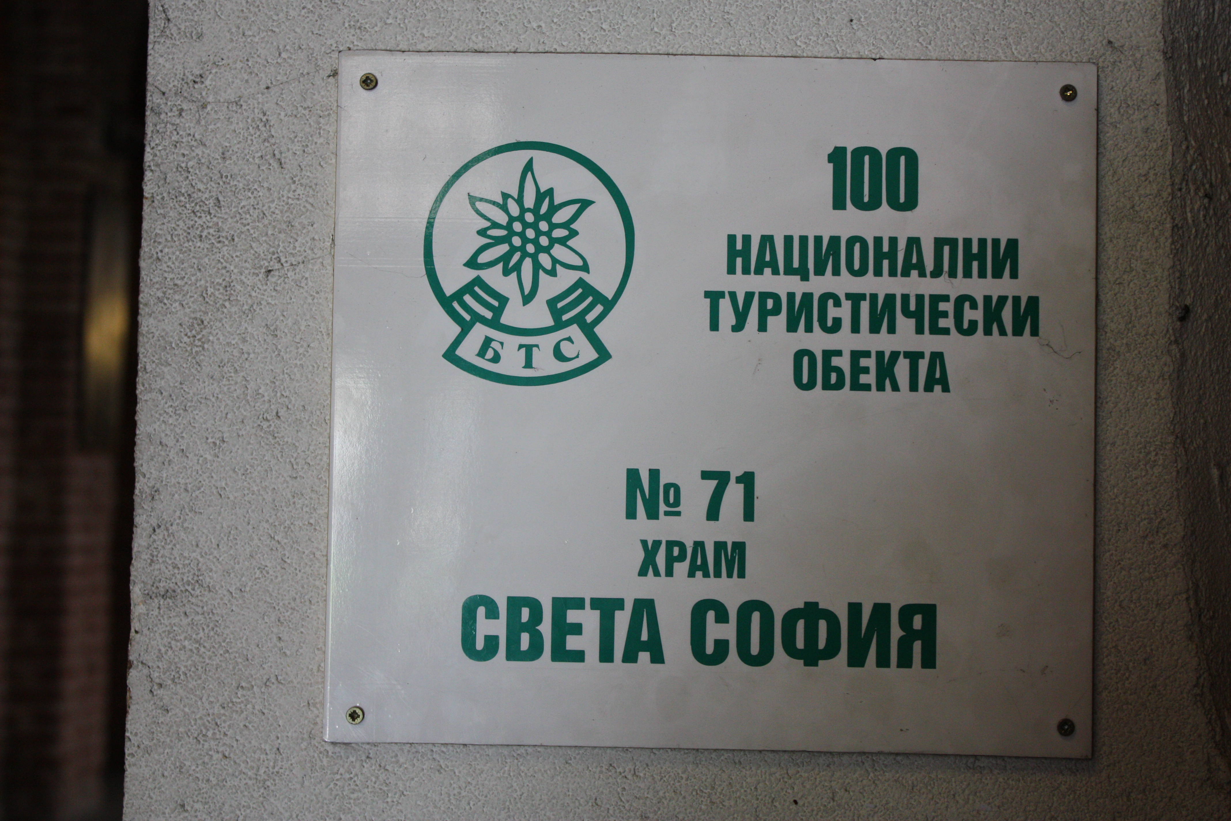 Български туристически съюз Bulgarischer Tourismusverband Sveta Sofia Objekt 71, Bulgaria